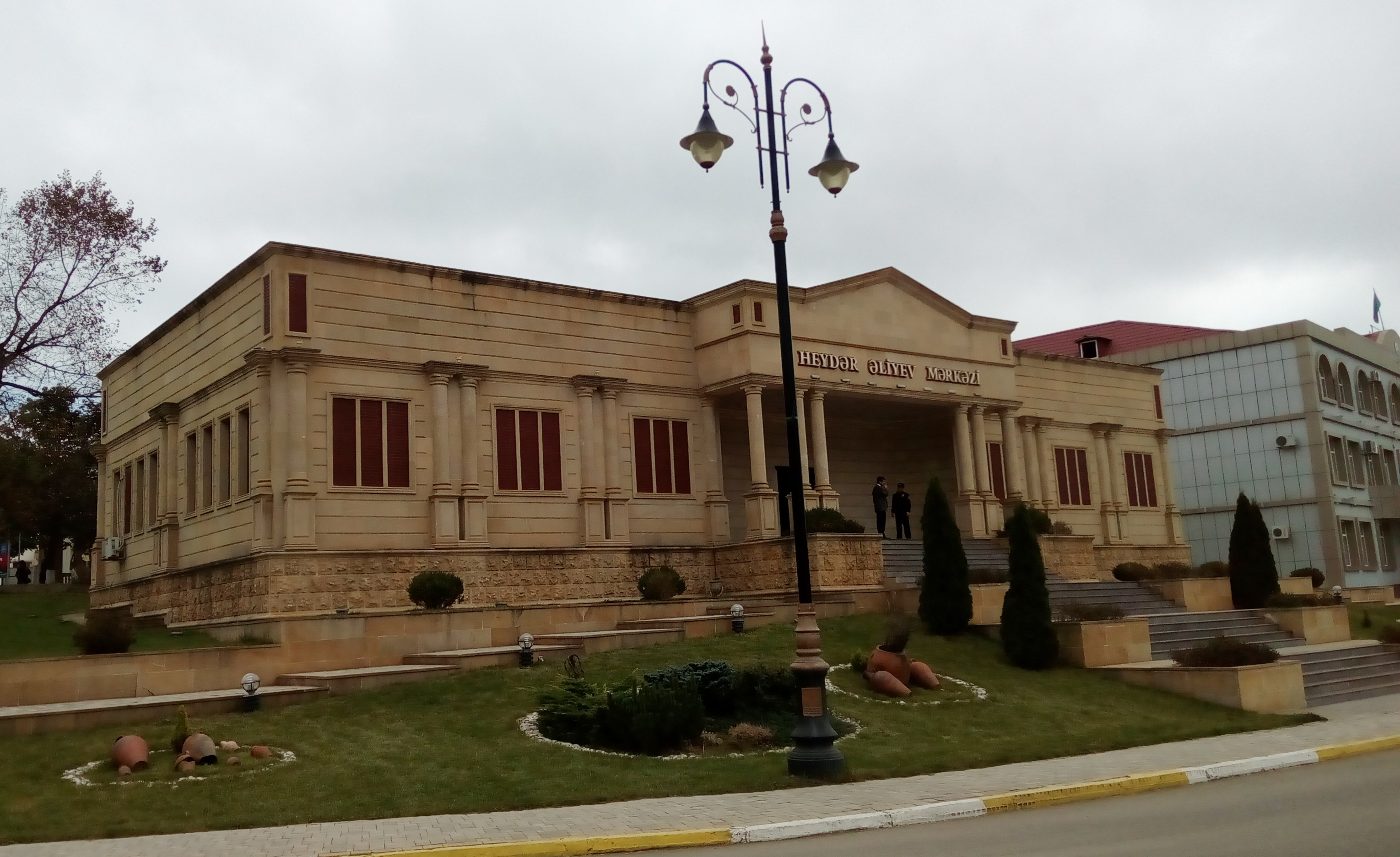 Lerik